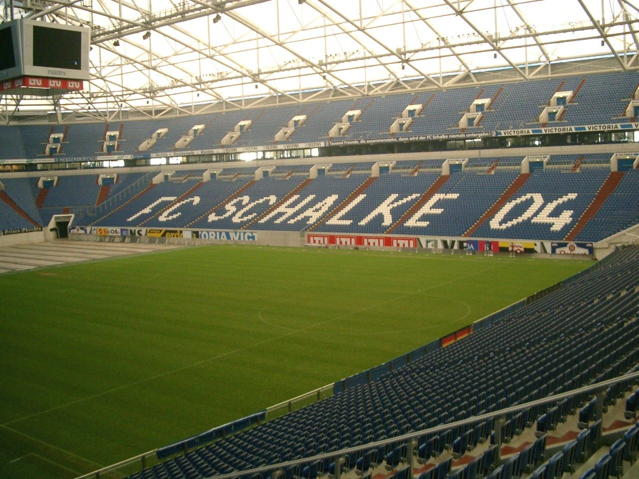 Veltins Arena, Schalke, Gelsenkirchen, Rasen wird reingefahren